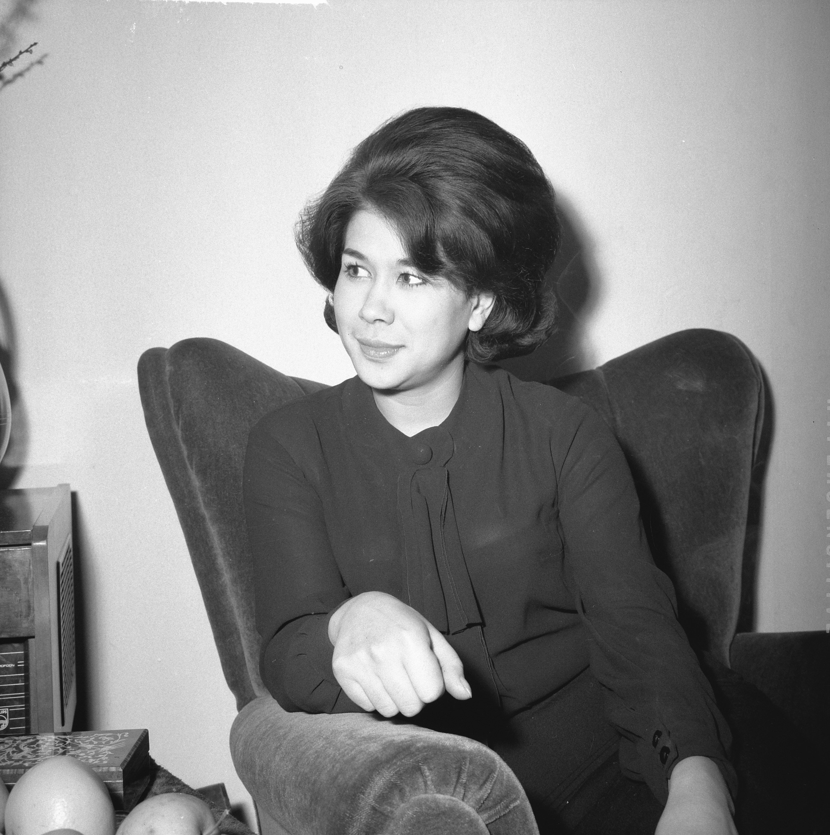 Collectie / Archief : Fotocollectie Anefo Reportage / Serie : Anneke Grönloh thuis Beschrijving : Anneke Grönloh Datum : 29 januari 1964 Locatie : Amsterdam Trefwoorden : portretten, zangers Persoonsnaam : Grönloh, Anneke Fotograaf : Broers, F.N. / Anefo Auteursrechthebbende : Nationaal Archief Materiaalsoort : Negatief (zwart/wit) Nummer archiefinventaris : bekijk toegang 2.24.01.03 Bestanddeelnummer : 916-0005